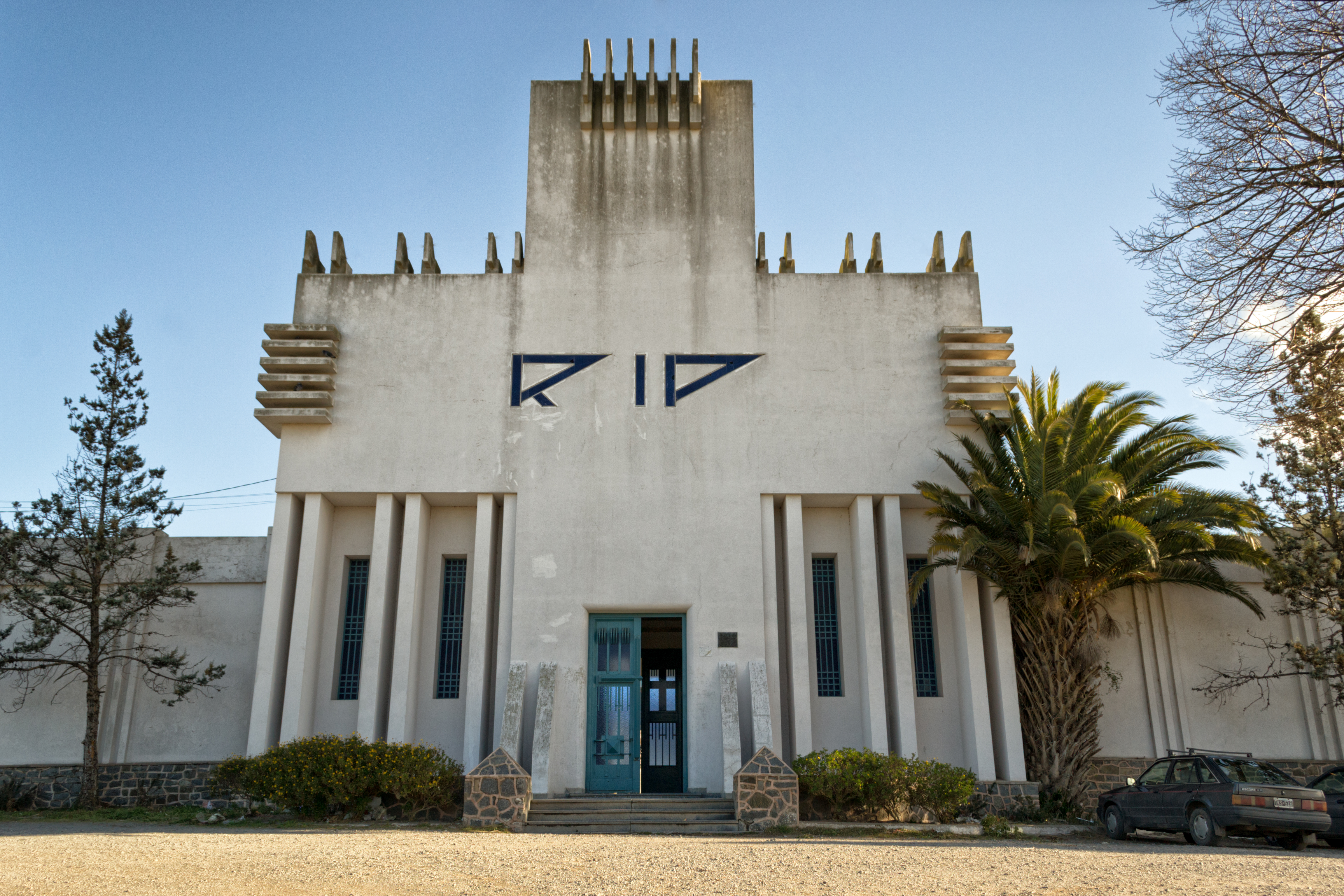 Portal del Cementerio Municipal de Balcarce